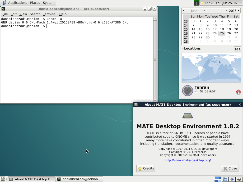 میزکار ماته روی دبیان گنو/هرد که در حال اجرای آیس‌ویزل، گیمپ و استارکلندر است.